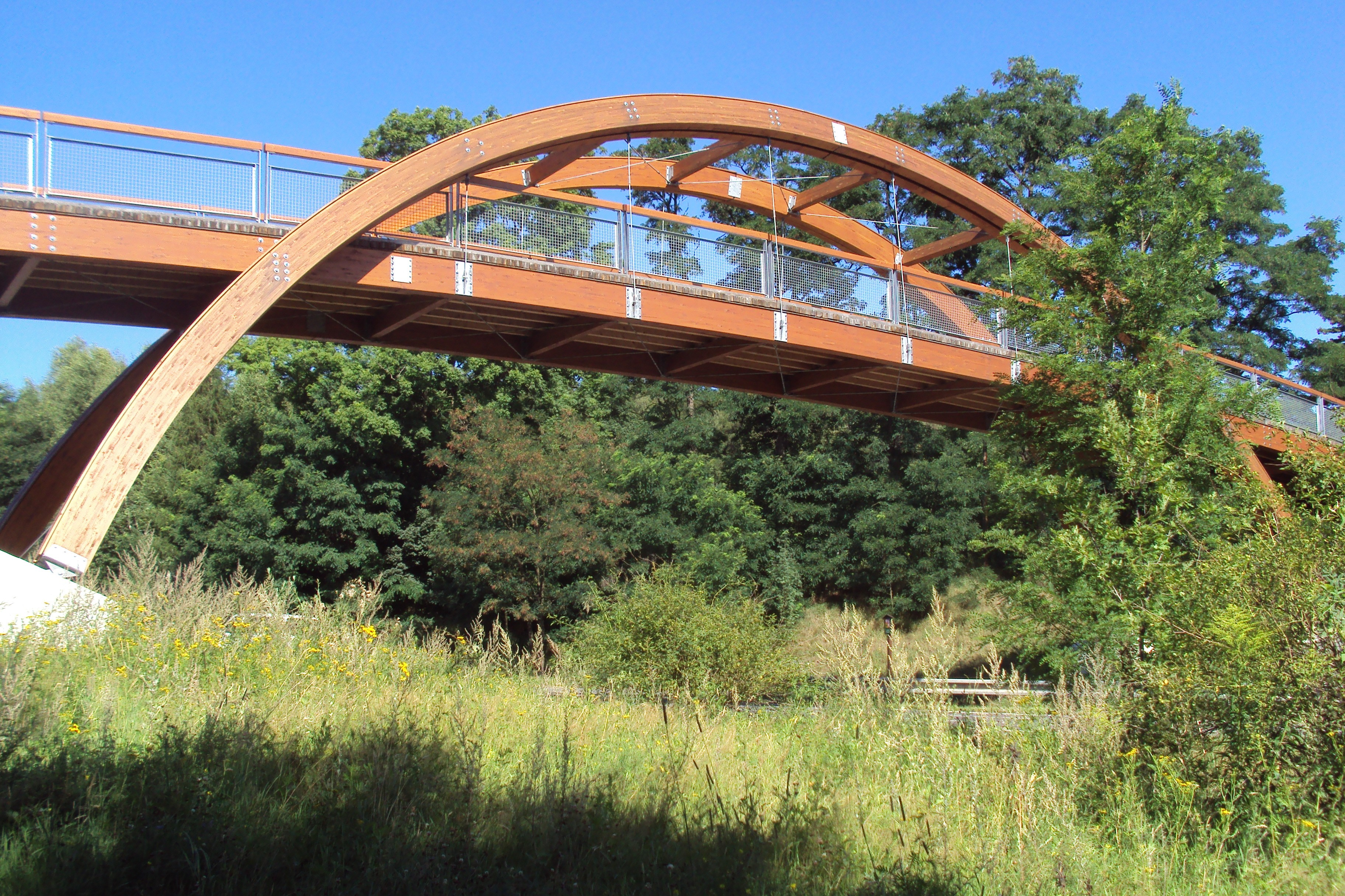 Lávka pro pěší (trasa červená E10) přes silnici E442 na západním kraji Nového Boru, oceněná v architektonické soutěži kraje